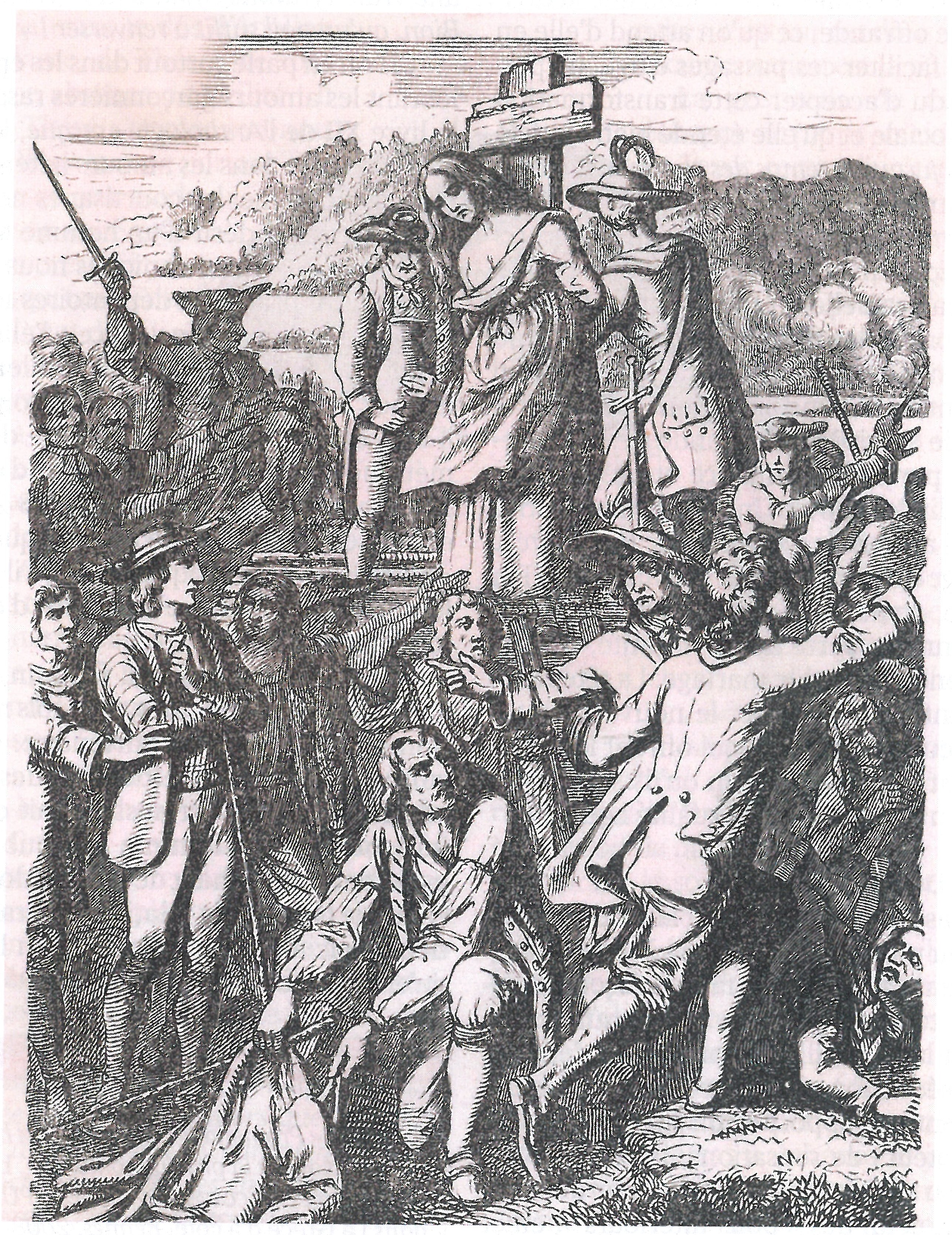 Femme suisse accusée de sorcellerie et condamnée au bûcher (gravure, vers 1700)